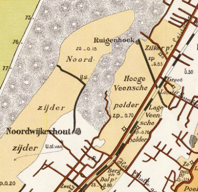 Hoge_Veense_polder